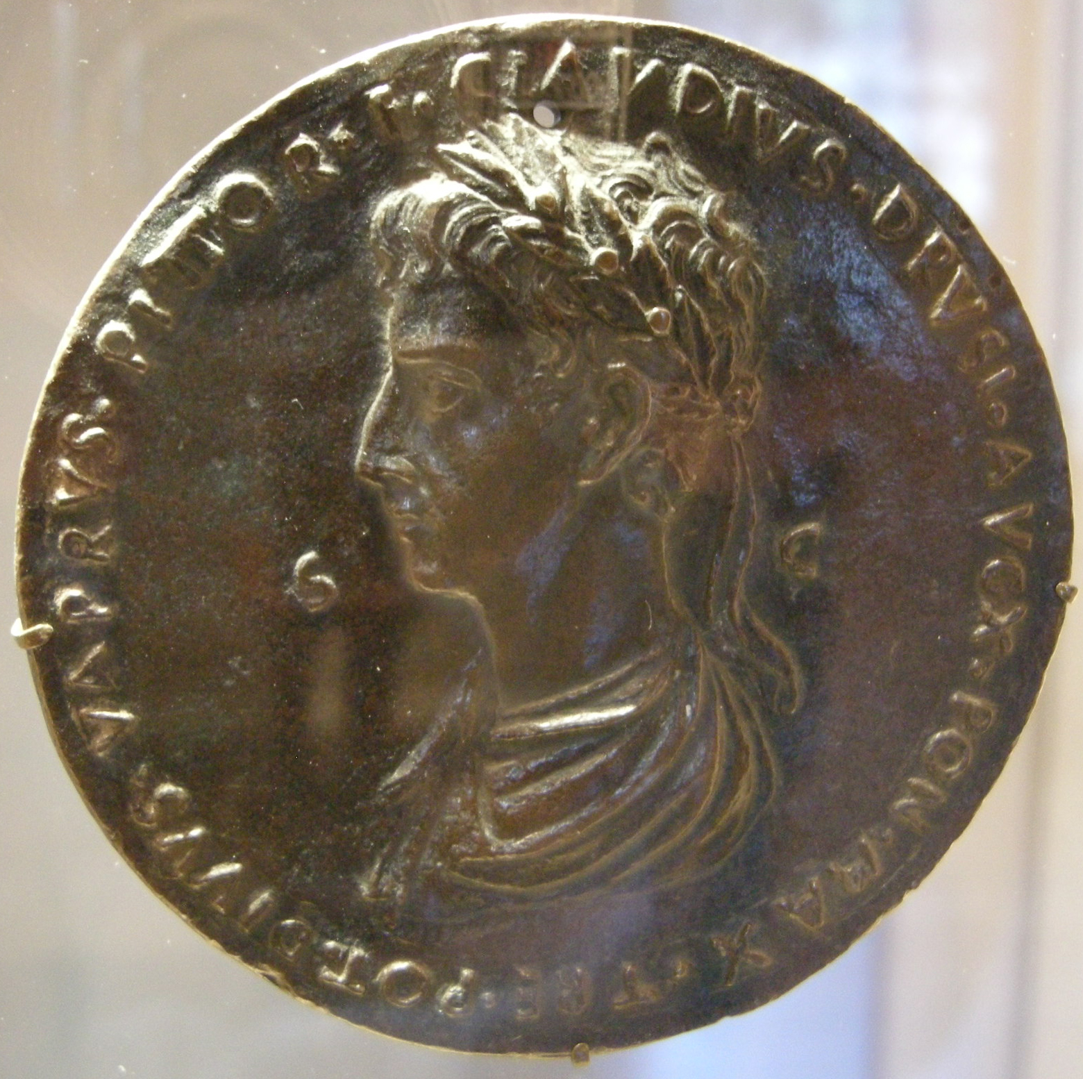 Varrone Belferdino, claudio, 1440s-1450s, recto